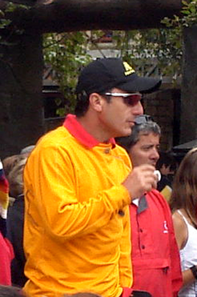 Cristián Bustos, triatleta chileno, durante el Ironman de Pucón. Tomada por Marco Correa.